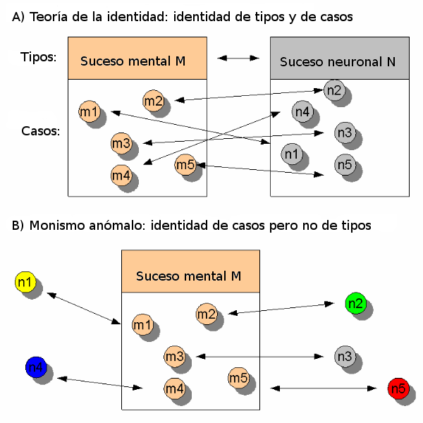 Esquema monismo anómalo